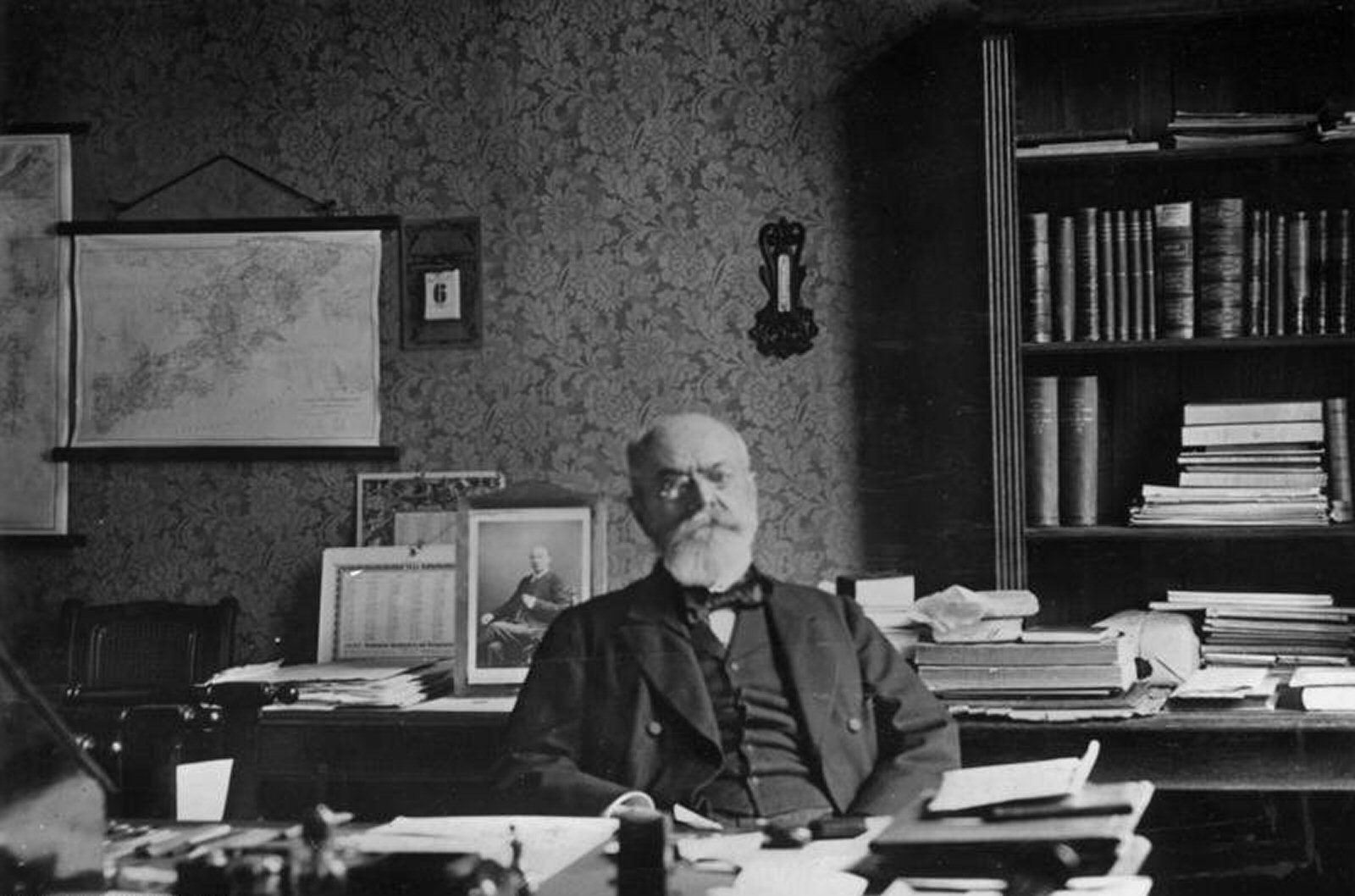 Friedrich von Holstein Scherl Bilderdienst Der Wirkl.Geh.Hofrat Fritz von Holstein bei der Arbeit im Auswärtigen Amt. (Nach einer Originalaufnahme des Geh.Hofrates Hans Wollmann.) 3794-37 [von Holstein in seinem Arbeitszimmer, die Aufnahme entstand vermutlich am 6.4.1906, dem Tag des Ausscheidens von Holsteins aus dem Dienst] Abgebildete Personen: Holstein, Friedrich von: Diplomat, Preußen, Deutschland. PND 11855316X